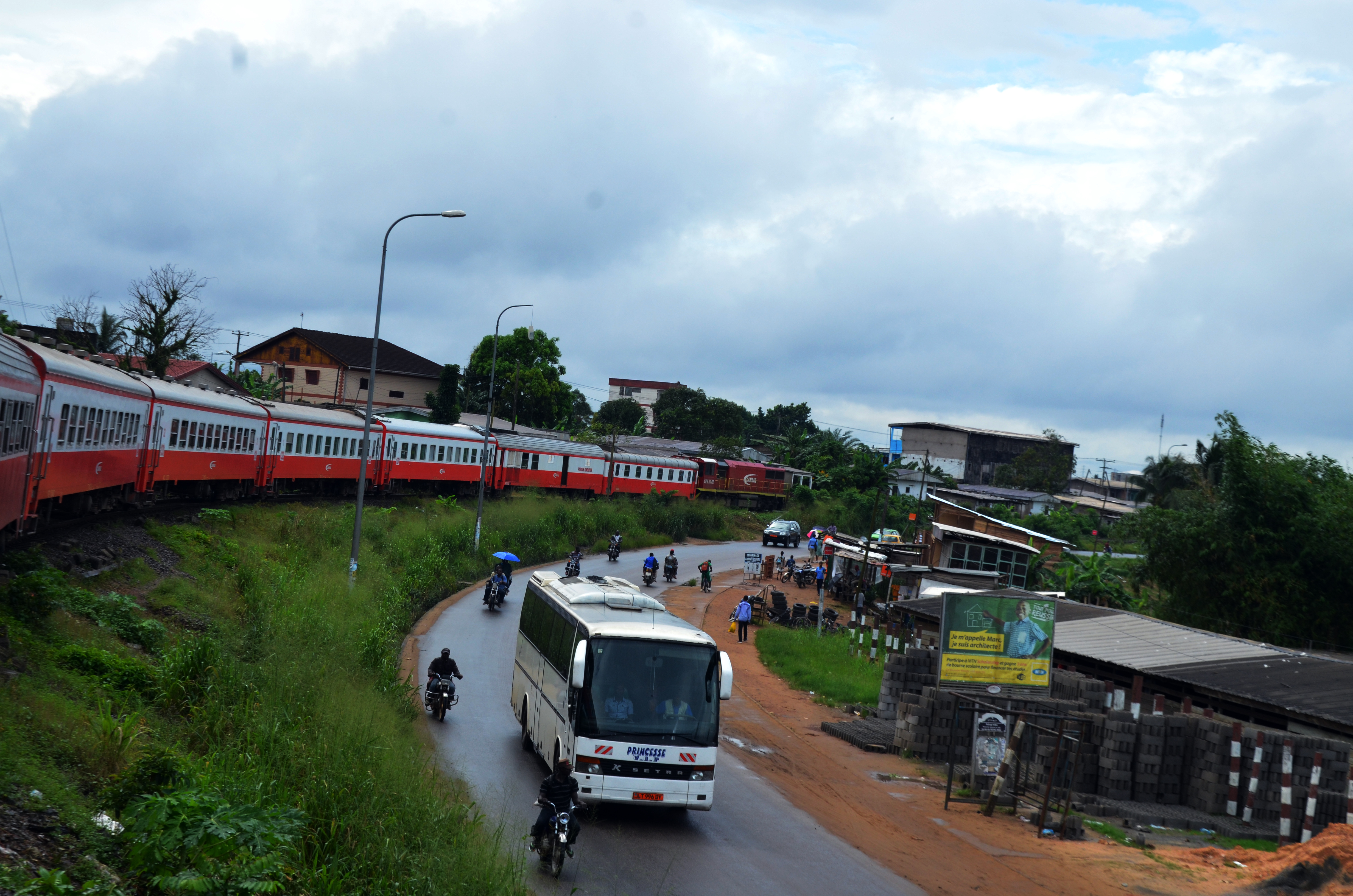 Le train inter city DOUALA-YAOUNDE au Cameroun This is an image with the theme "Africa on the Move or Transport" from: Cameroon